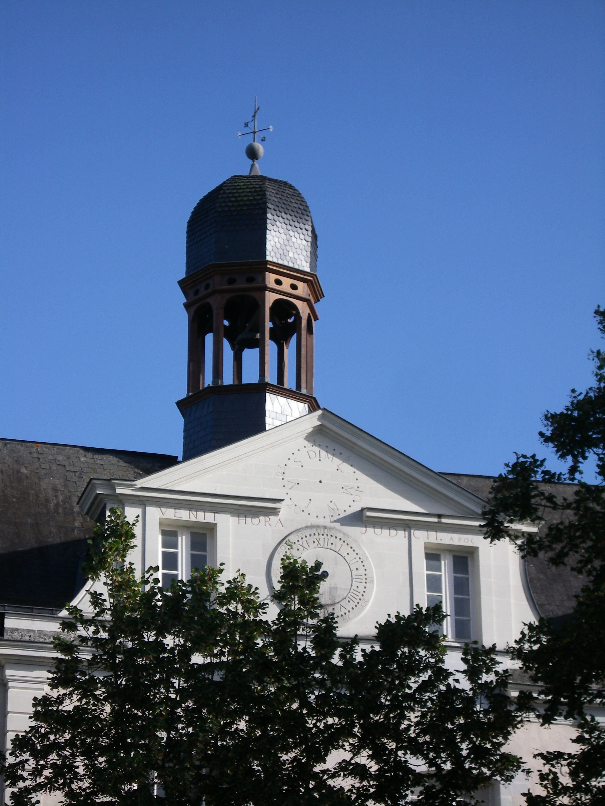 lycée Victor-Hugo Campanile du Bâtiment de l'horloge